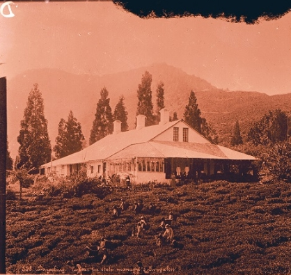 "Darjeeling Tukvar tea estate manager's bungalow